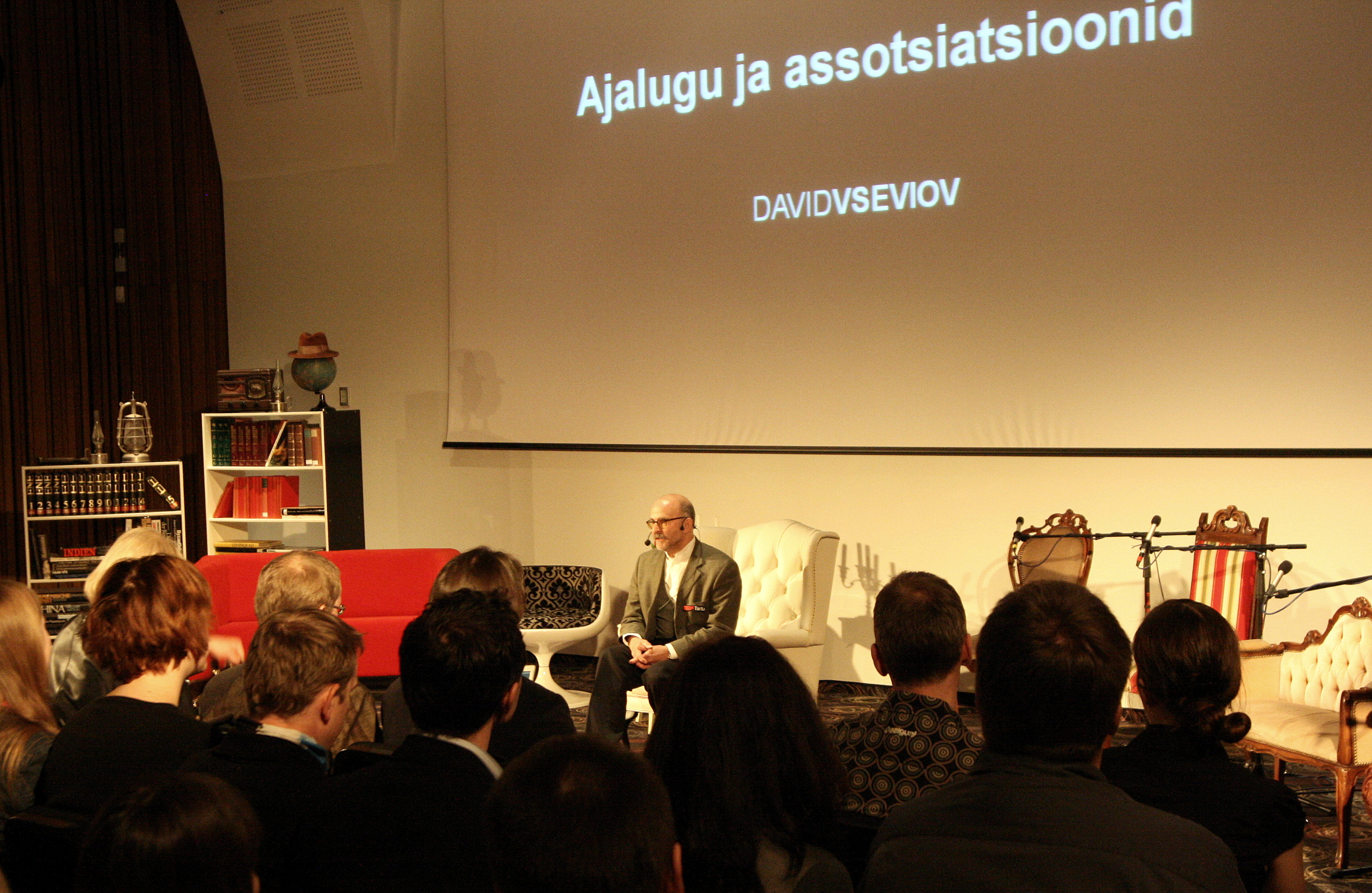 David Vseviov TEDxTartu konverentsil 2010. aastal [1]